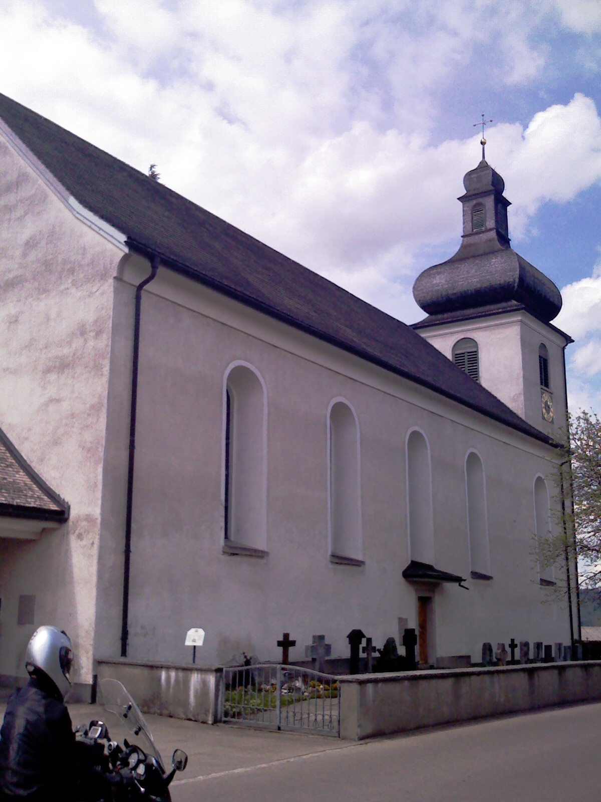 Hemberg, Catholic Church, Toggenburg, Switzerland - Hemberg en Togenburgo, katolika preĝejo, Svislando